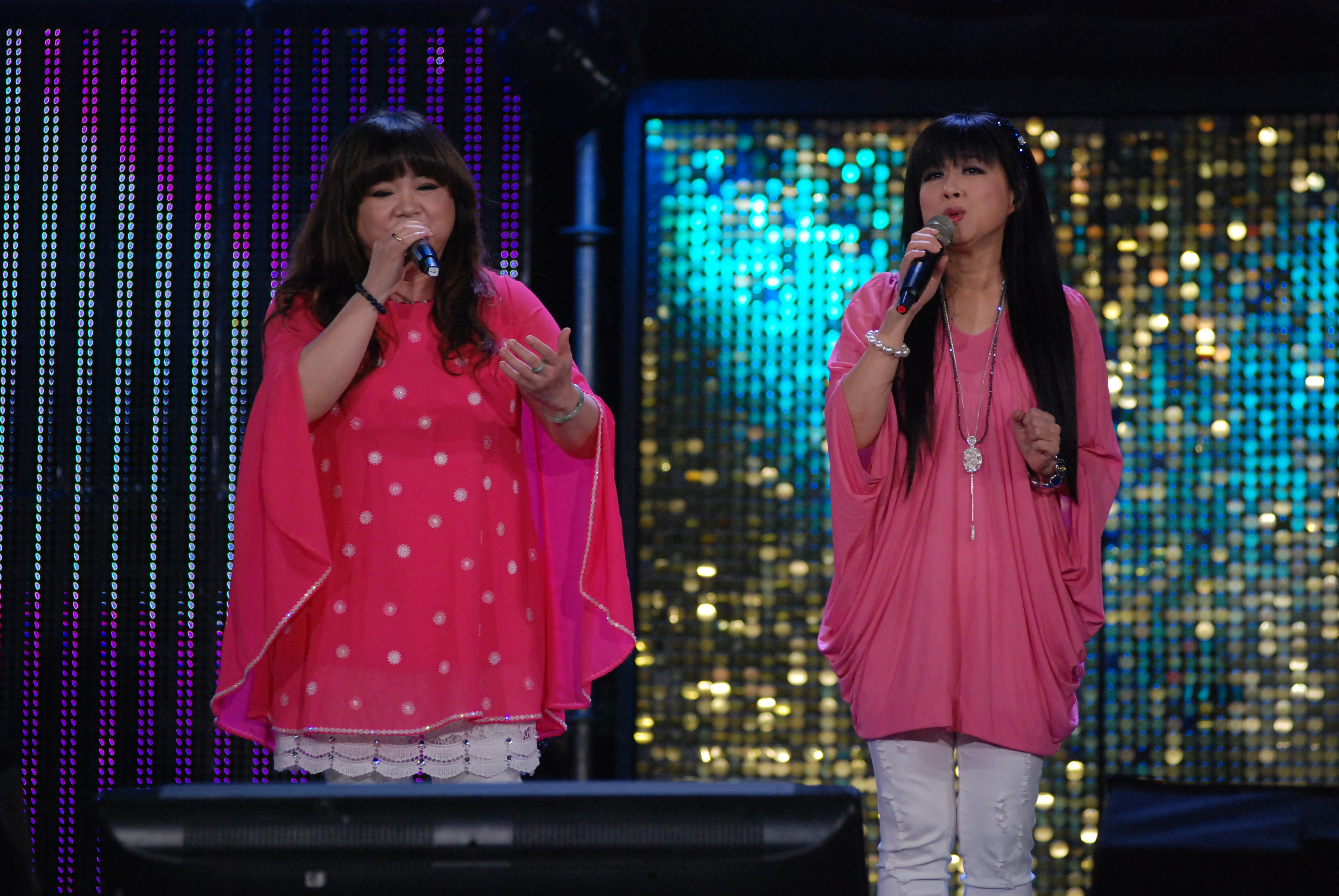 南方二重唱出席三立電視綜藝節目《超級夜總會》錄影。